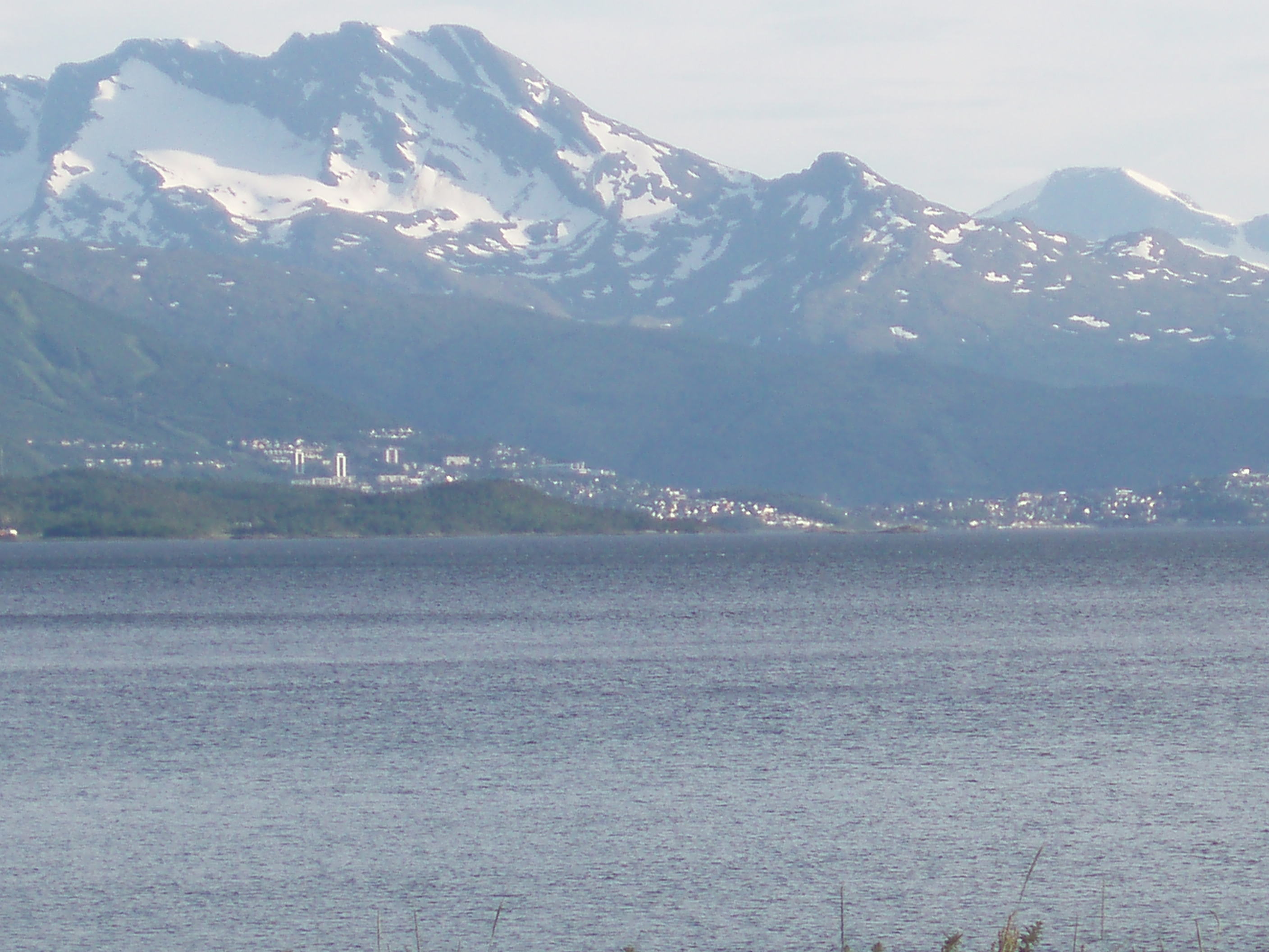 Narvik seen from Bjerkvik